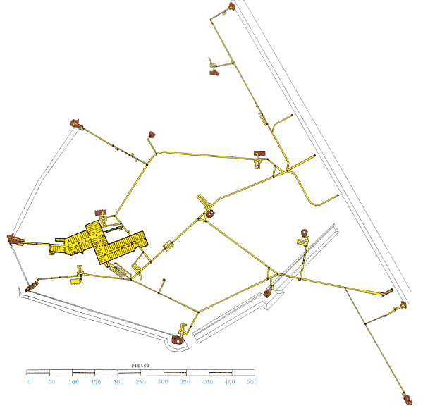 Plattegrond van het Fort Eben Emael te België.